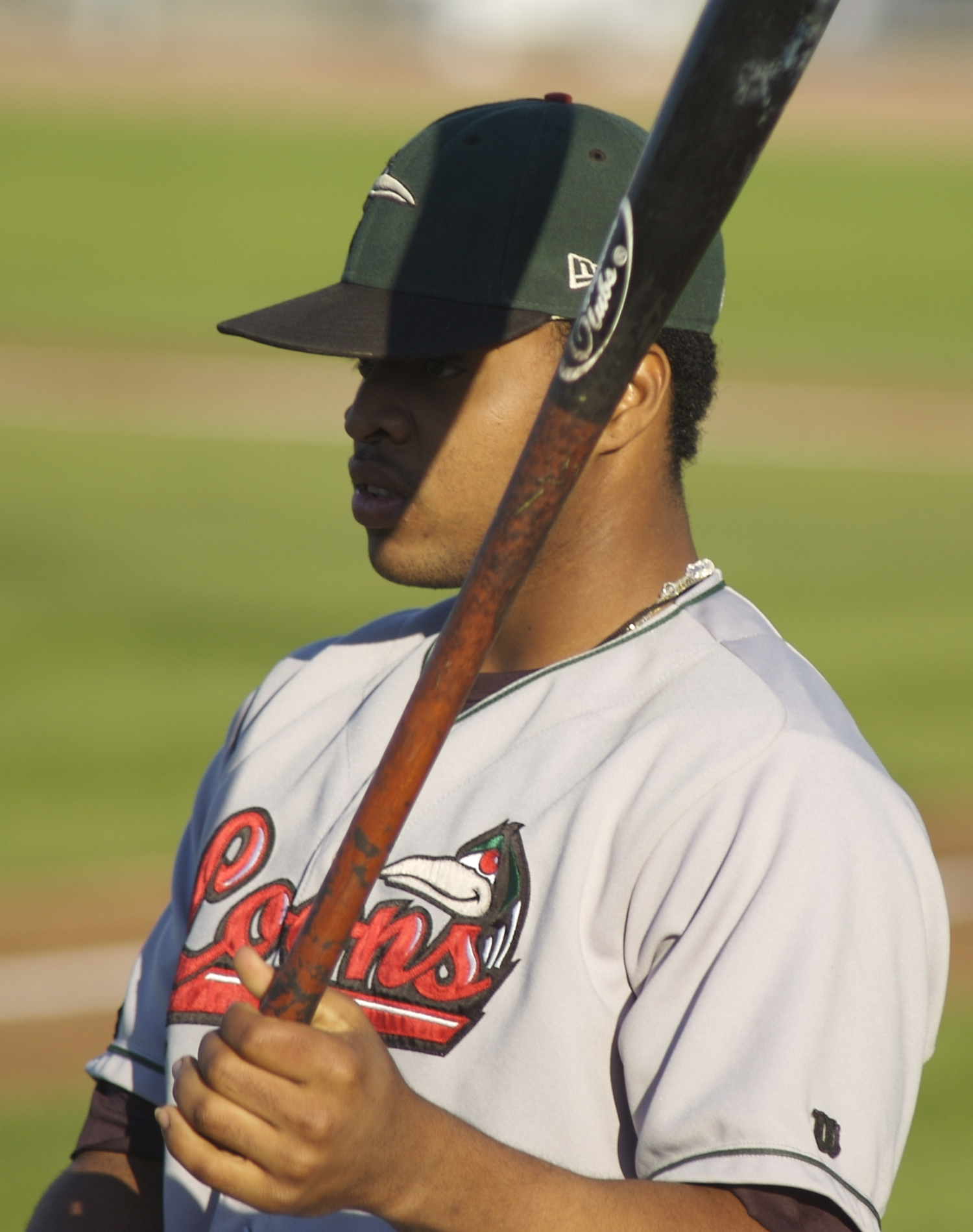 Carlos Santana